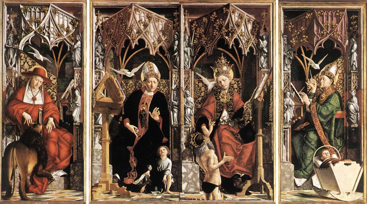 Les Pères de l'Église : Jérôme, Augustin, Grégoire, Ambroise